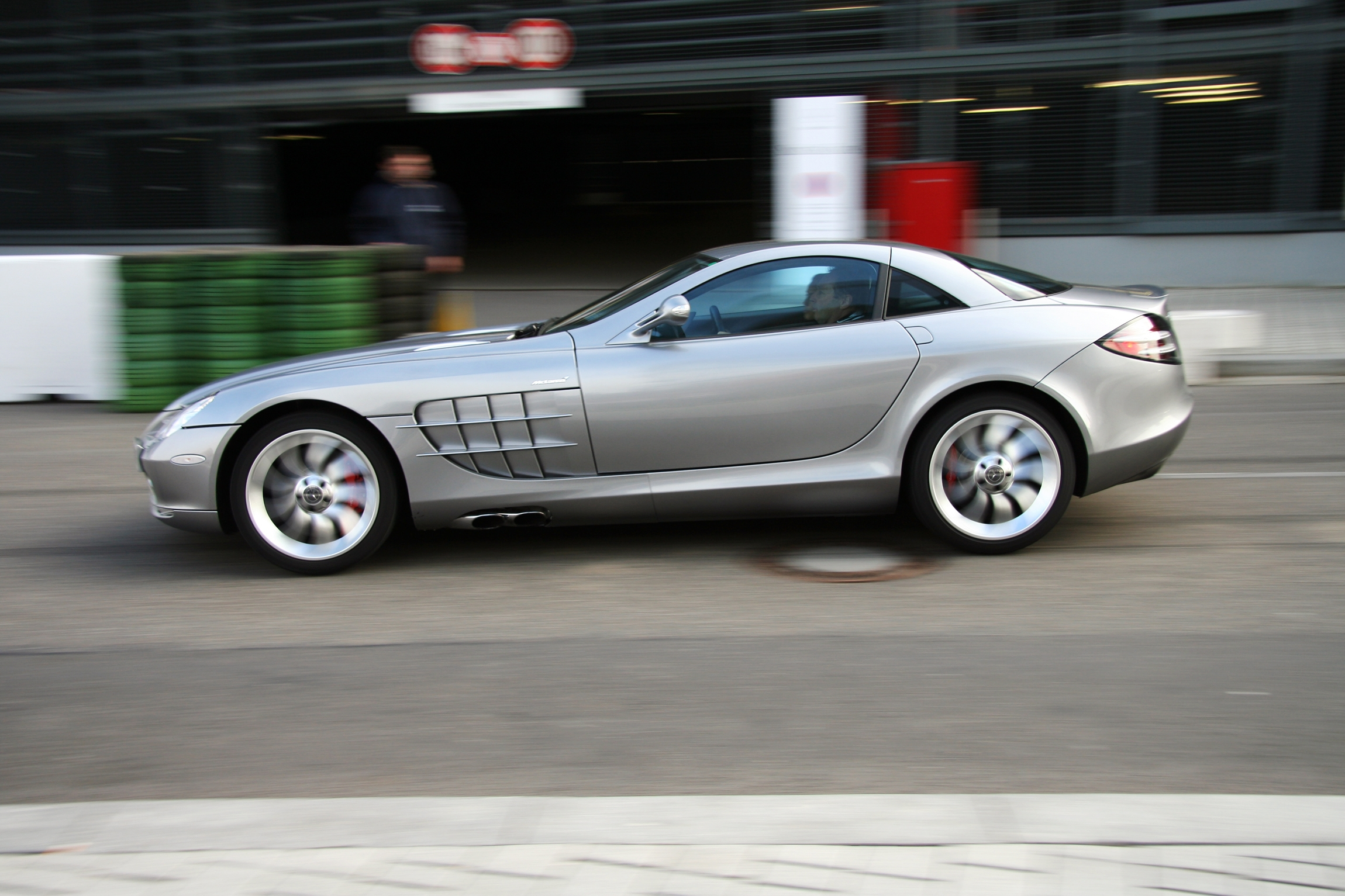 Mercedes-Benz SLR (C199)